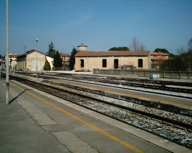 Altra area merci dismessa.